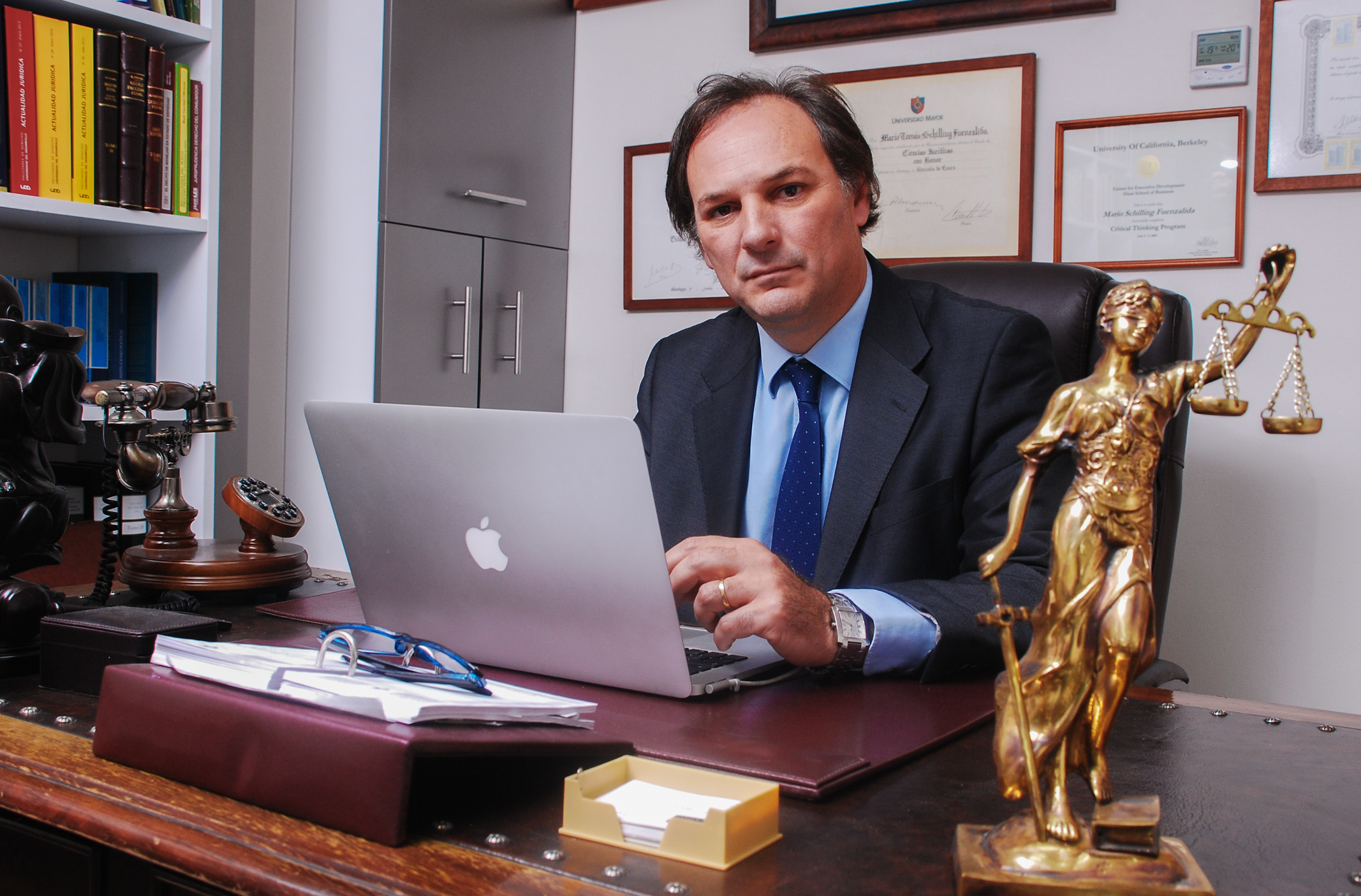 Mario Schilling Fuenzalida, abogado chileno.